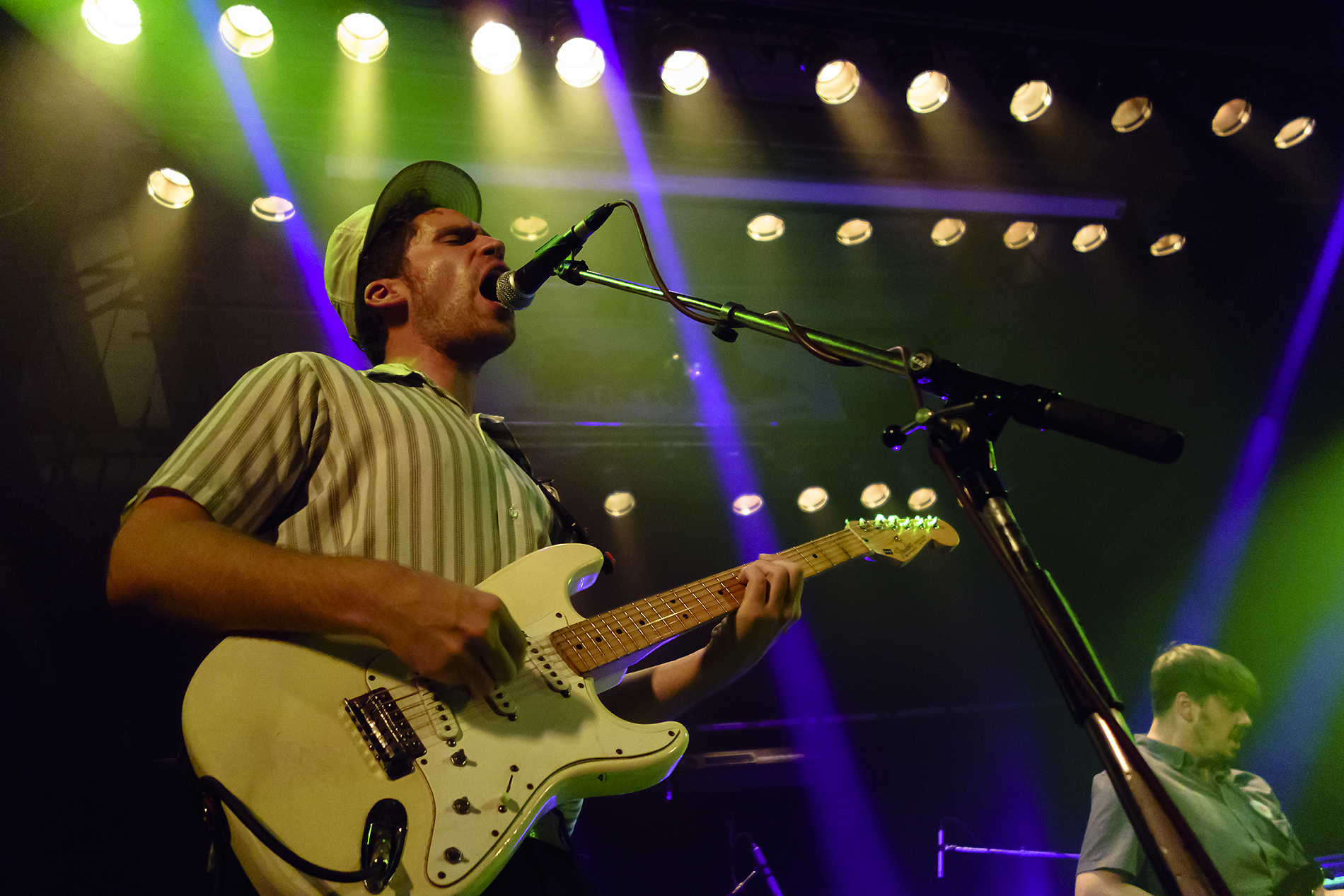 Parquet Courts at ULU